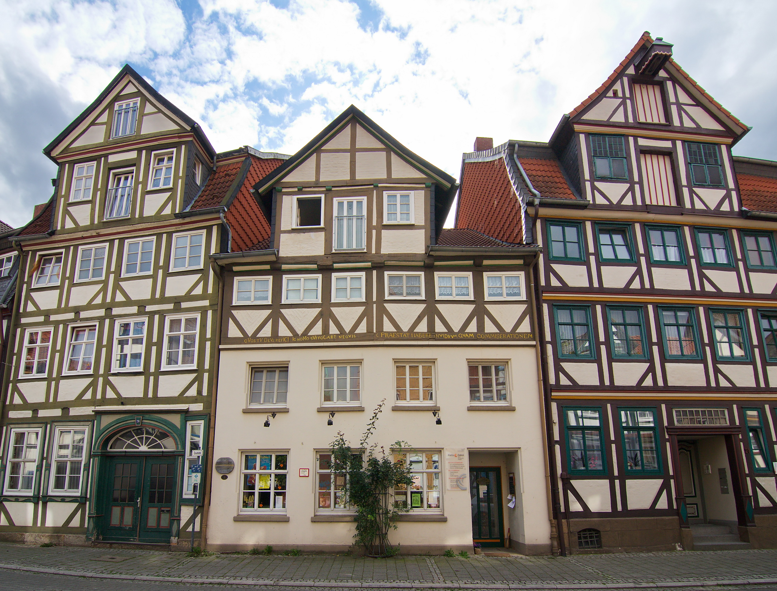 Das Dammviertel stellt siedlungsgeschichtlich den ältesten Teil der Stadt Peine. Hier entwickelte sich im Mittelalter eine jüdische Gemeinde.